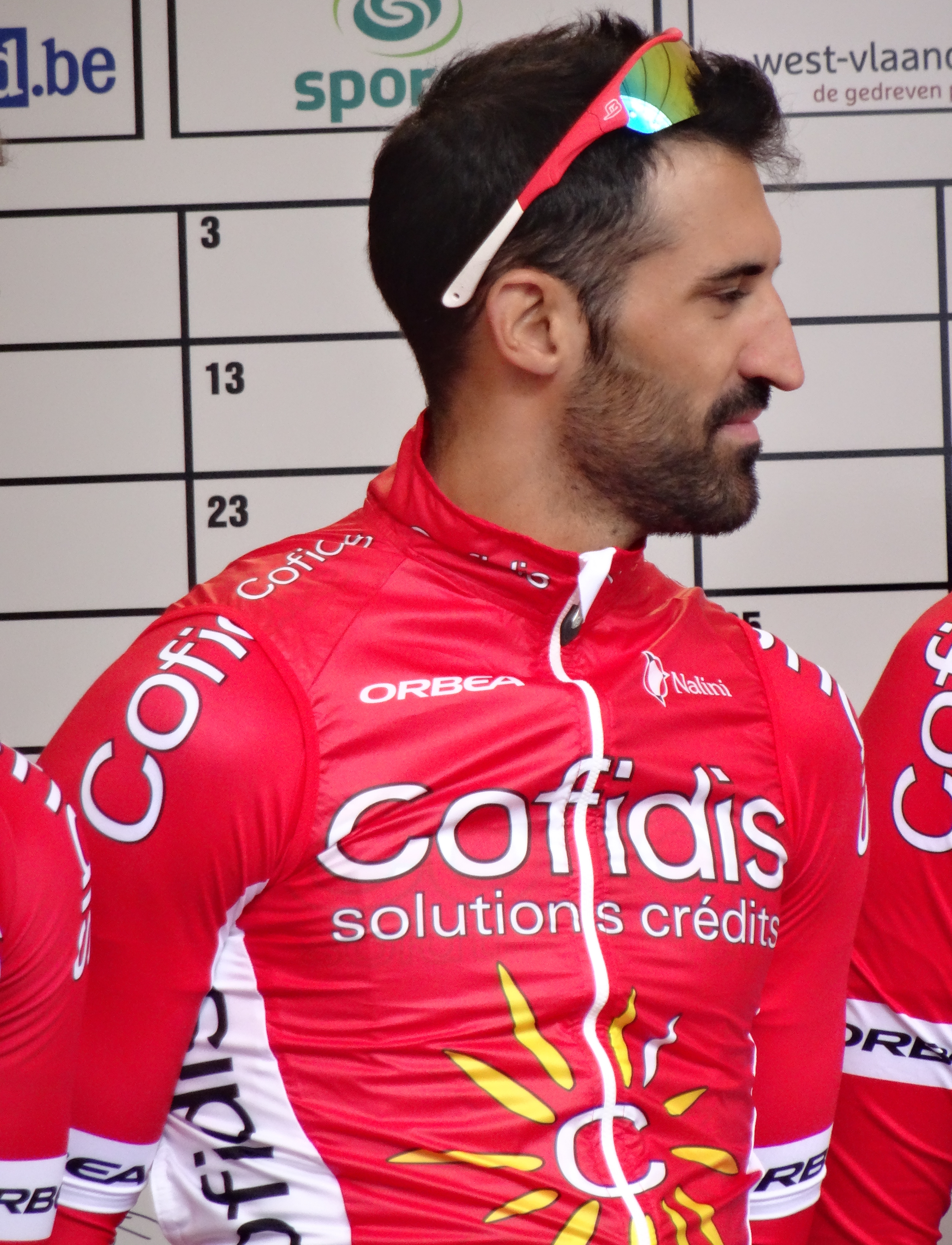 Reportage réalisé le dimanche 1er mars à l'occasion du départ et de l'arrivée de Kuurne-Bruxelles-Kuurne 2015 à Kuurne, Belgique.